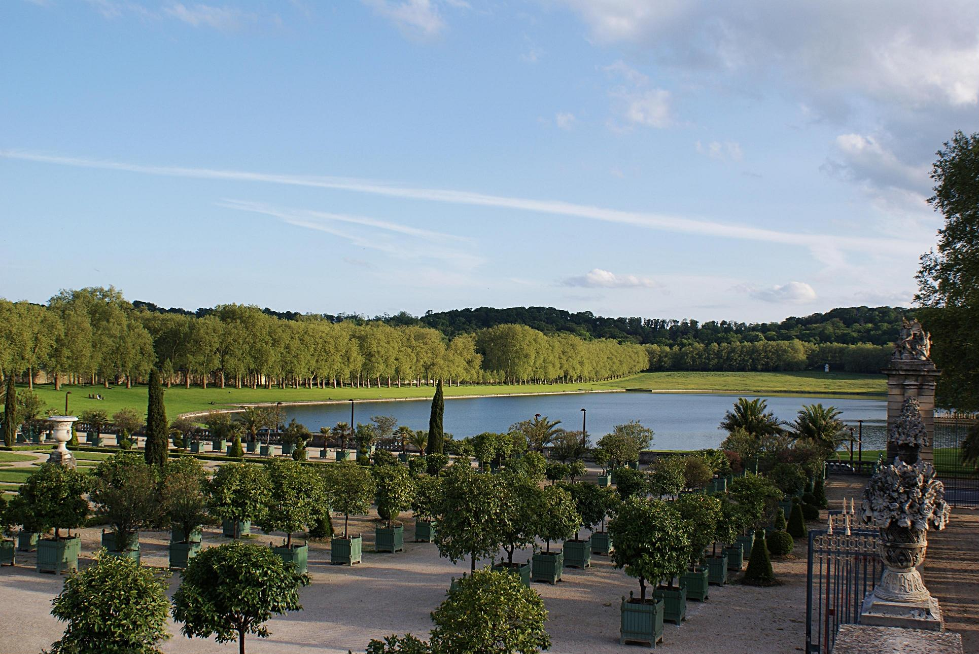 La pièce d'eau des Suisses depuis le Parterre de l'Orangerie - Petit Parc du Château de Versailles Removed watermark: Jérémy Flavien Hubert